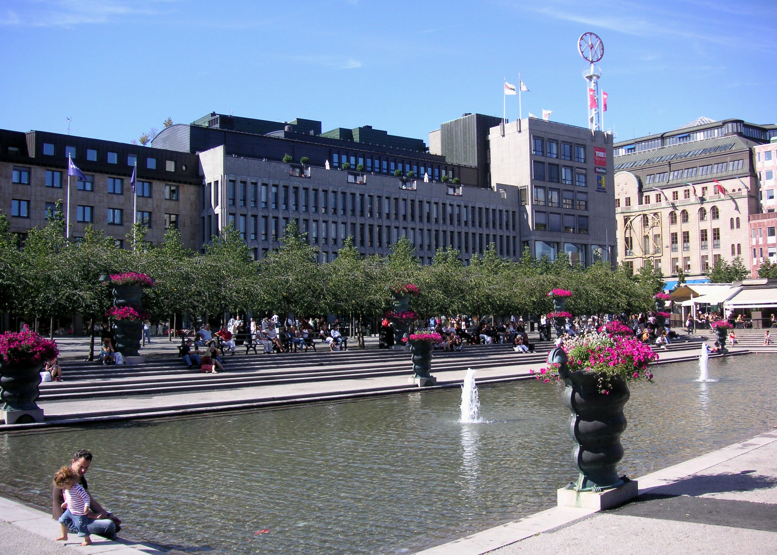 Kungsträdgården i Stockholm 2007